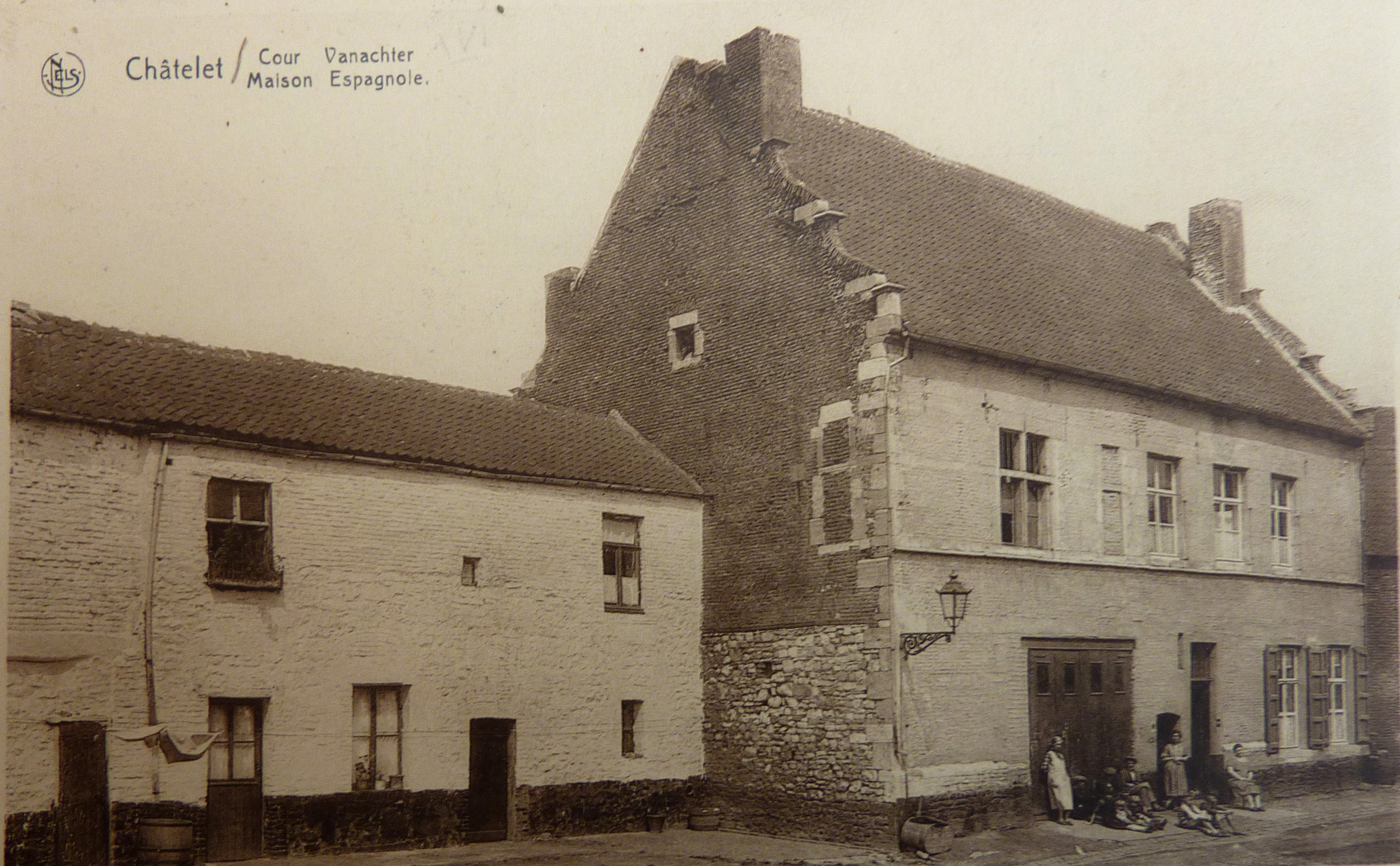 Rue de Bouffioulx. Vue de la façade est de la Maison Espagnole, XIXe siècle.